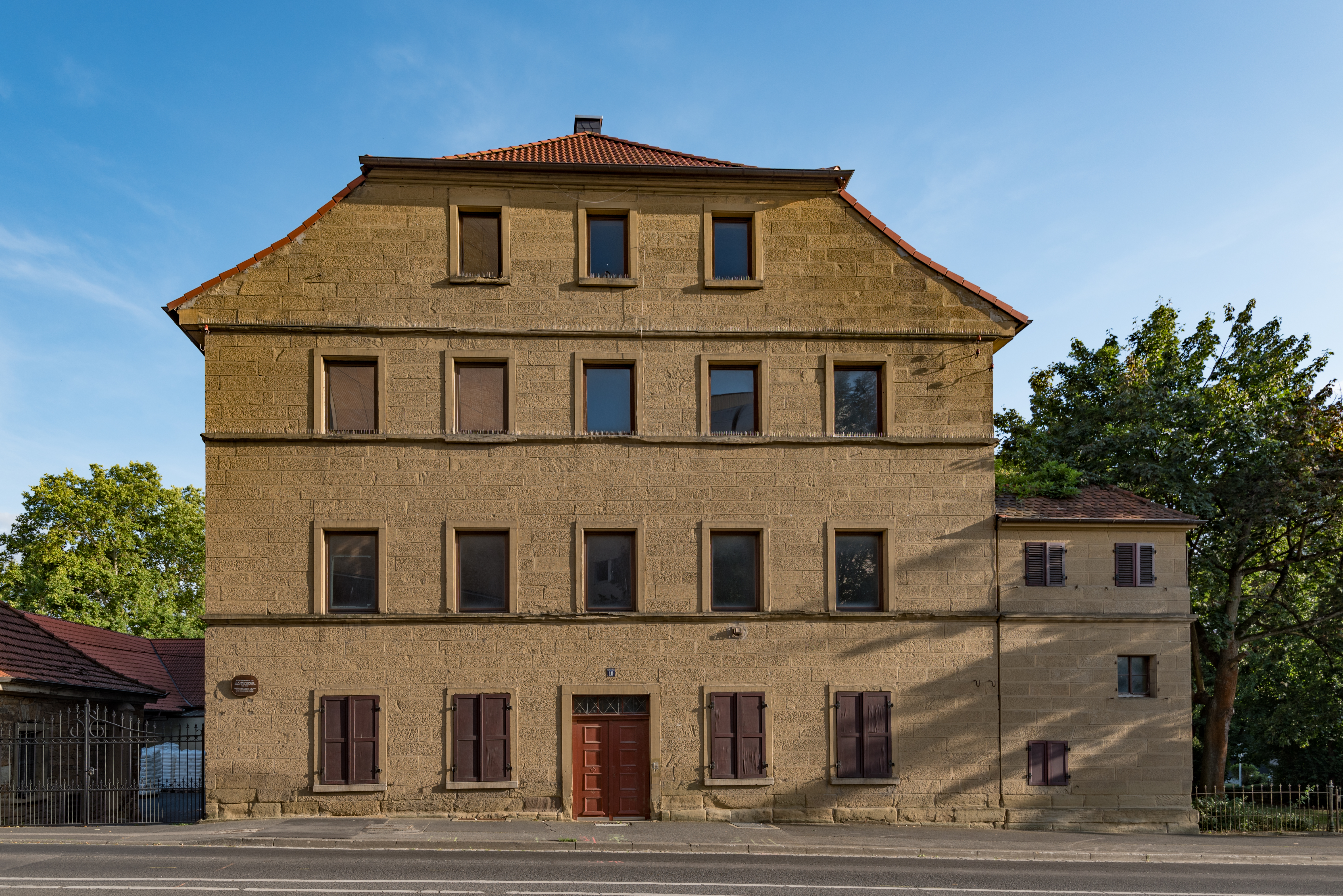 Schweinfurt, Mainberger Straße 10